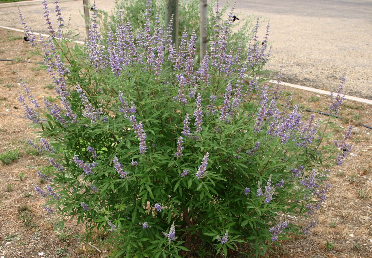 Vitex agnus-castus: Habit